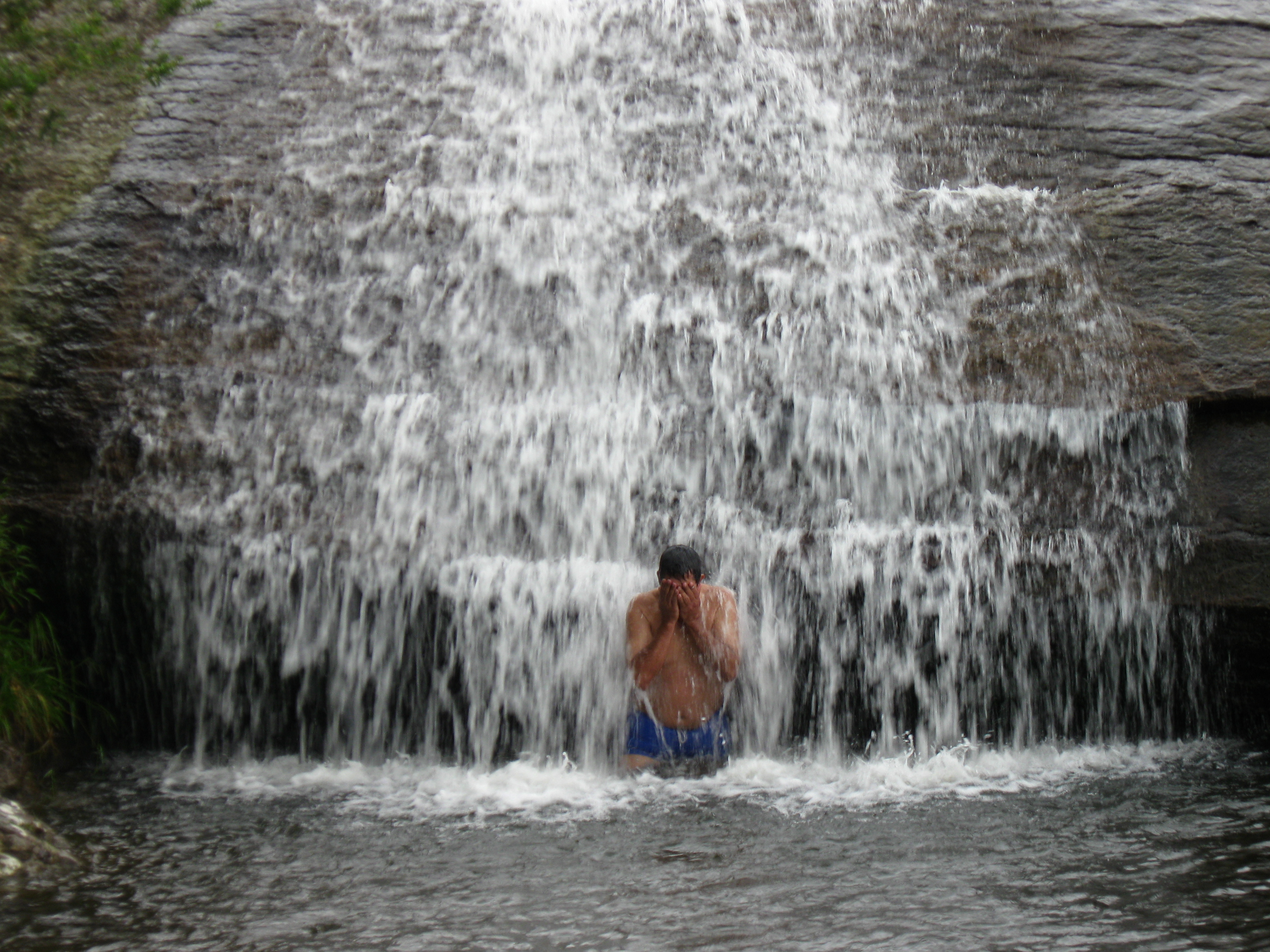 Cascada Pozo de la Gloria, Guadalupe, Santander, Colombia